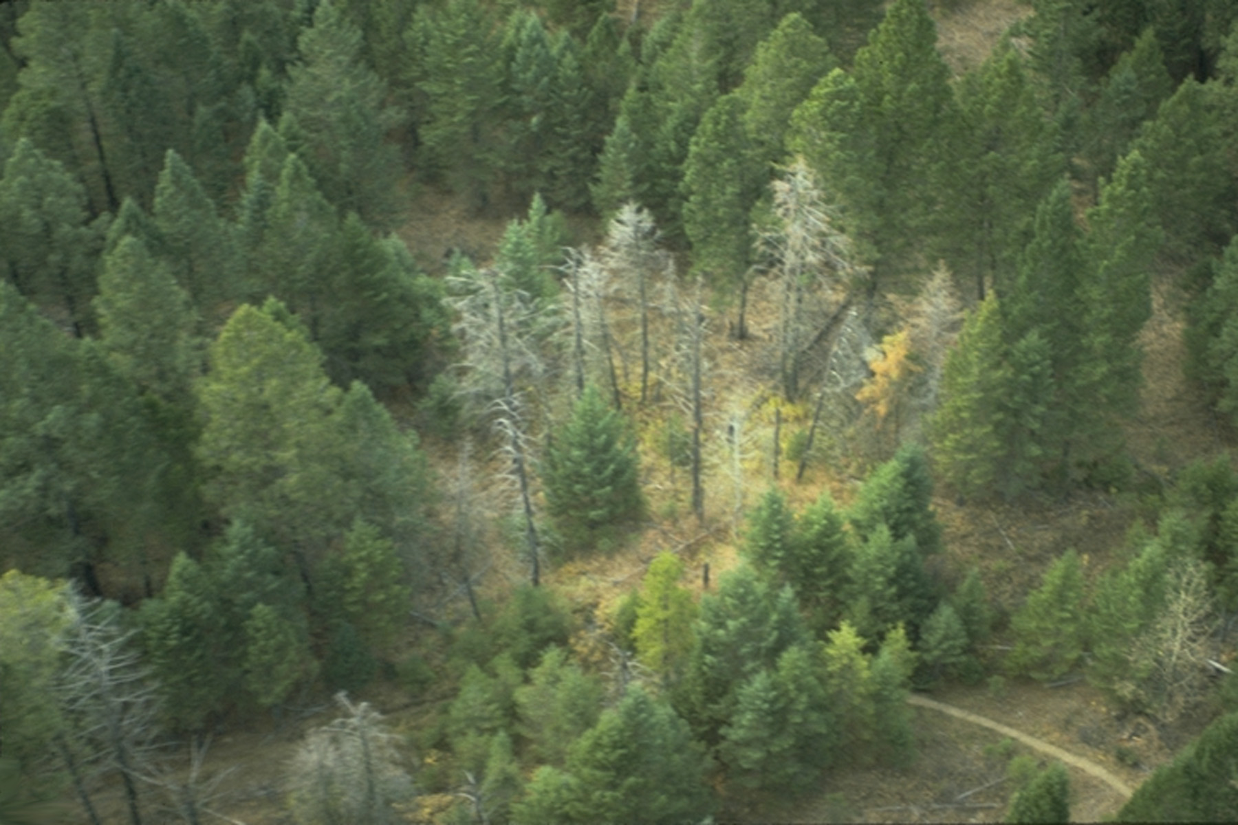 Destruíção de uma Floresta Americana pelo fungo Armillaria ostoyae